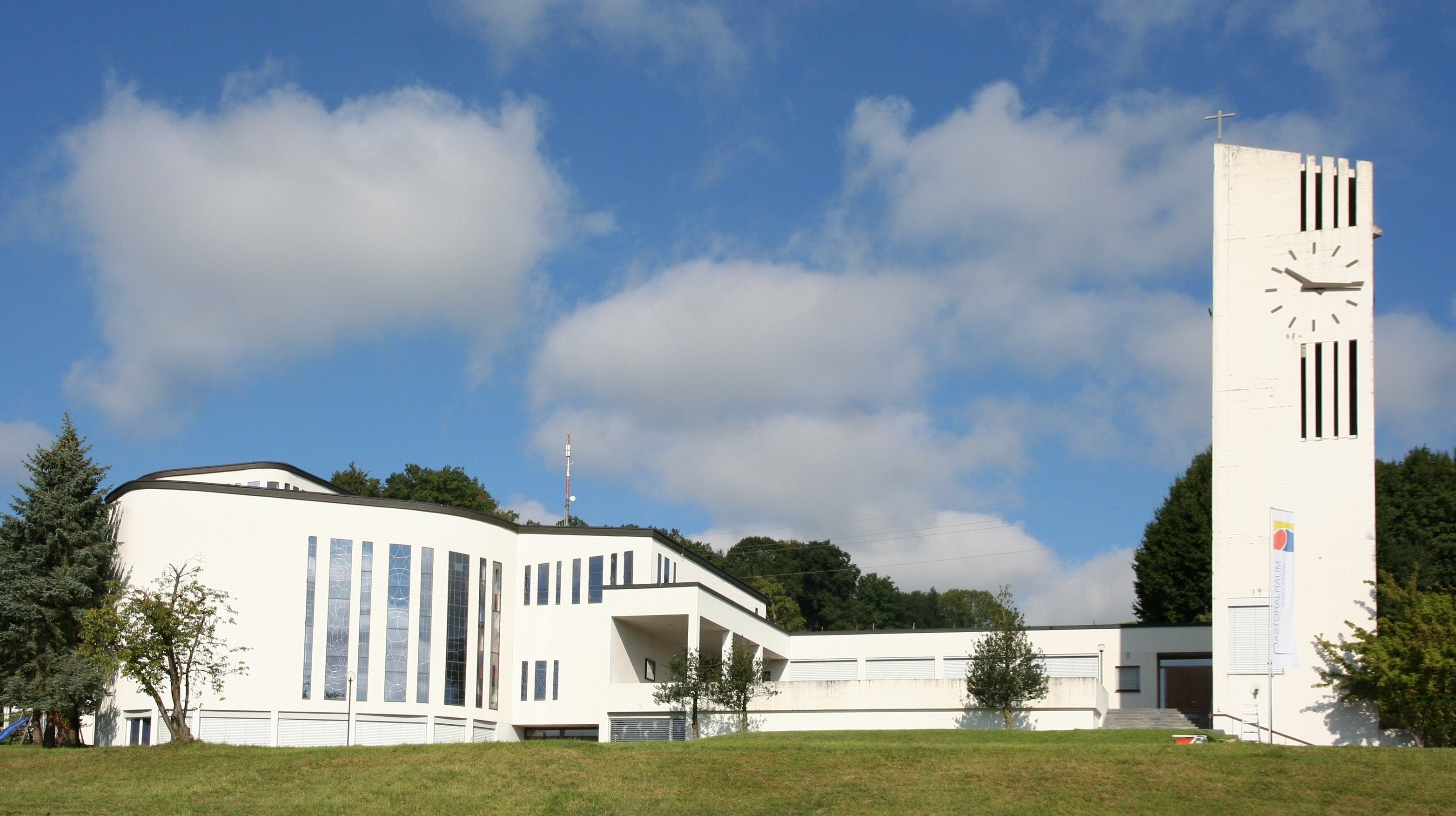 röm.-kath. Pfarrkirche Maria Königin Sitterdorf TG